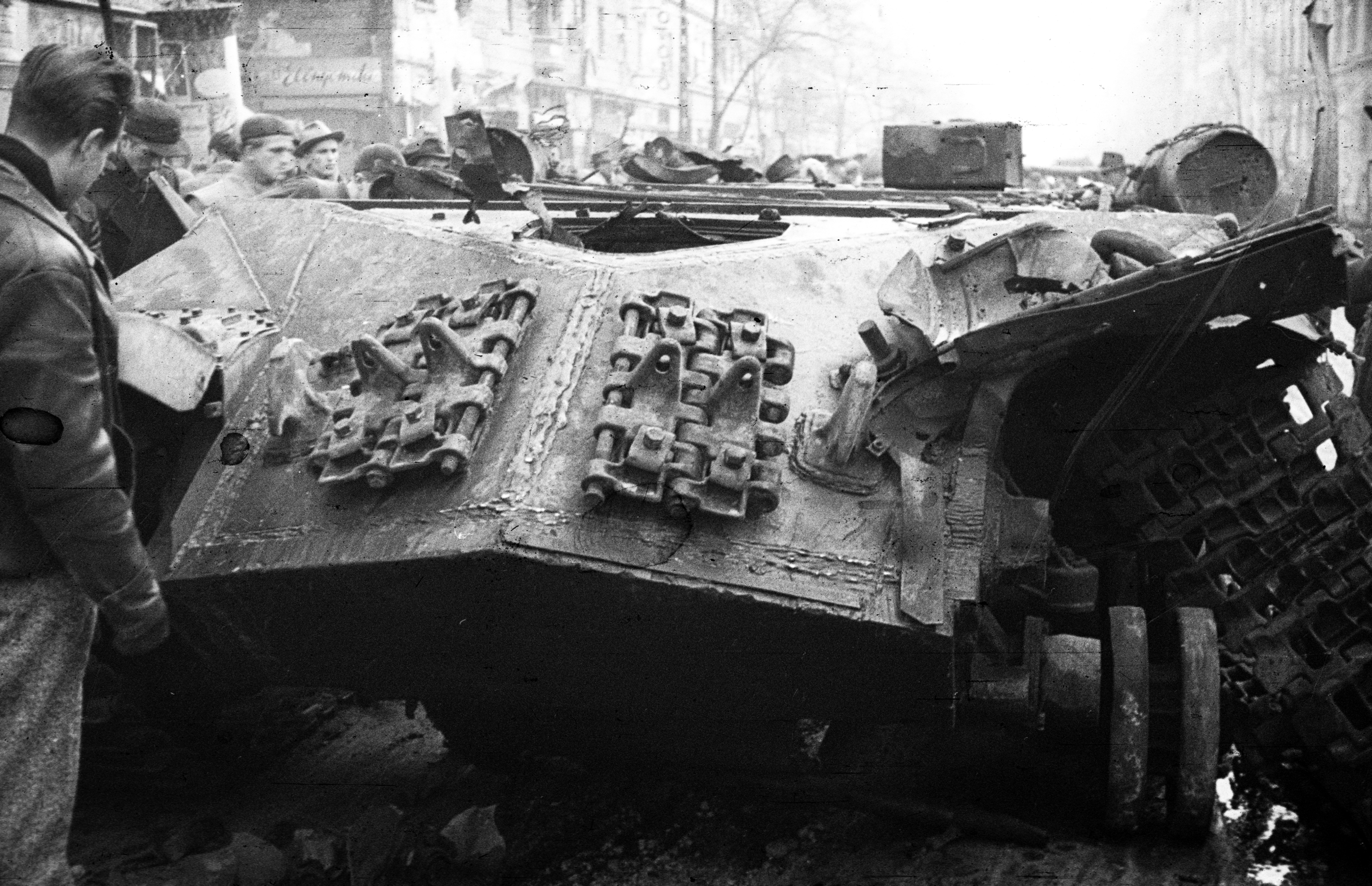 Üllői út a Ferenc körút felől nézve, balra az átjáró a Corvin (Kisfaludy) köz felé. ISZ-3 harckocsi roncsa a Kilián laktanya előtt. Location: Hungary, Budapest Tags: wreck, Soviet brand, tank, IS-3 tank, revolution Title: Üllői út a Ferenc körút felől nézve, balra az átjáró a Corvin (Kisfaludy) köz felé. ISZ-3 harckocsi roncsa a Kilián laktanya előtt.